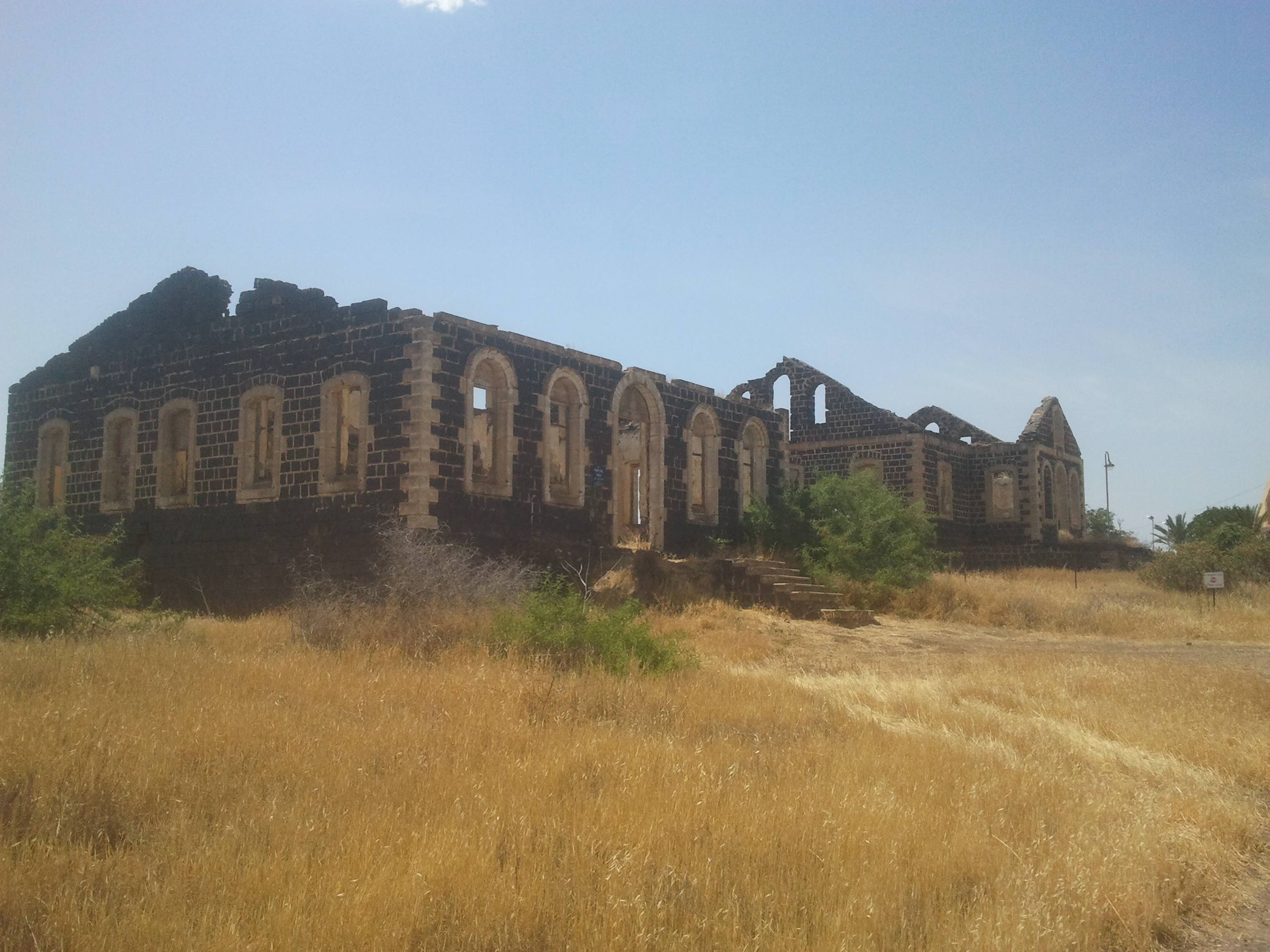 אחוזת פוריה (חוות פוריה) הייתה התיישבות שהוקמה בשנת 1910 ברכס פוריה על ידי חברת אחוזת סנט לואיס. מבני האחוזה השוכנים ביישוב פוריה עילית, הוכרזו כאתר מורשת בישראל.